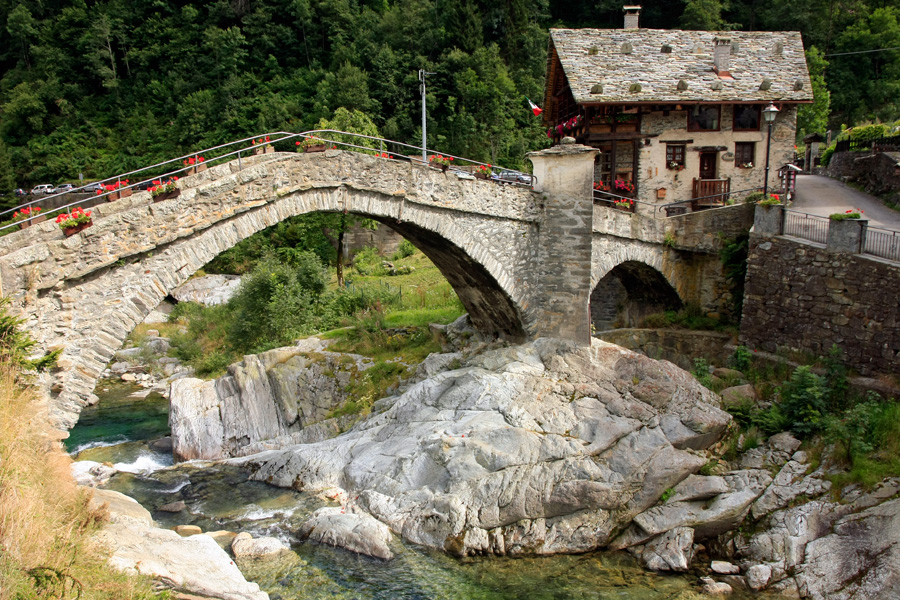 Ponte Medioevale a Rassa